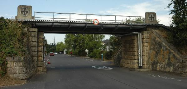 Eisenbahnbrücke in Feldbach (Steiermark)